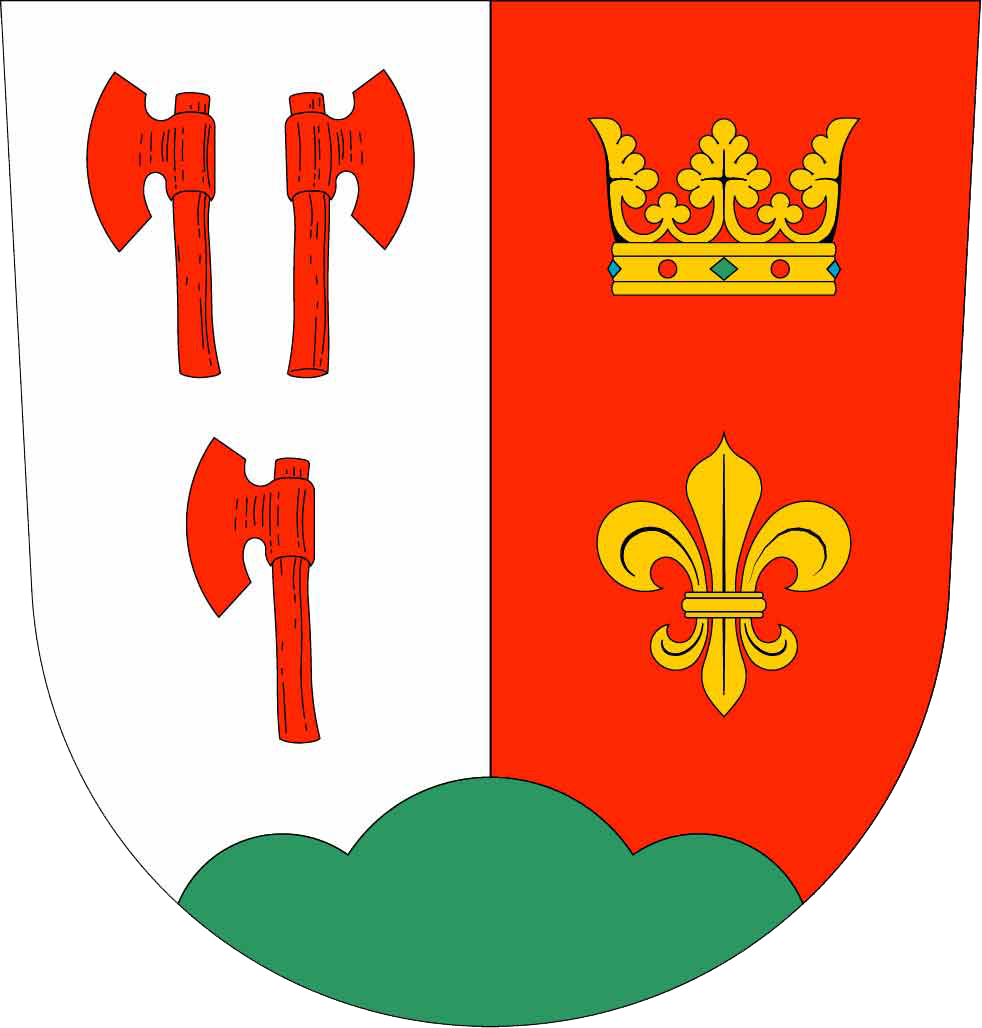 Wappen von Meißner